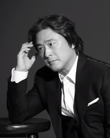 Marie Claire Korea 임권택과 10인의 감독들 박찬욱